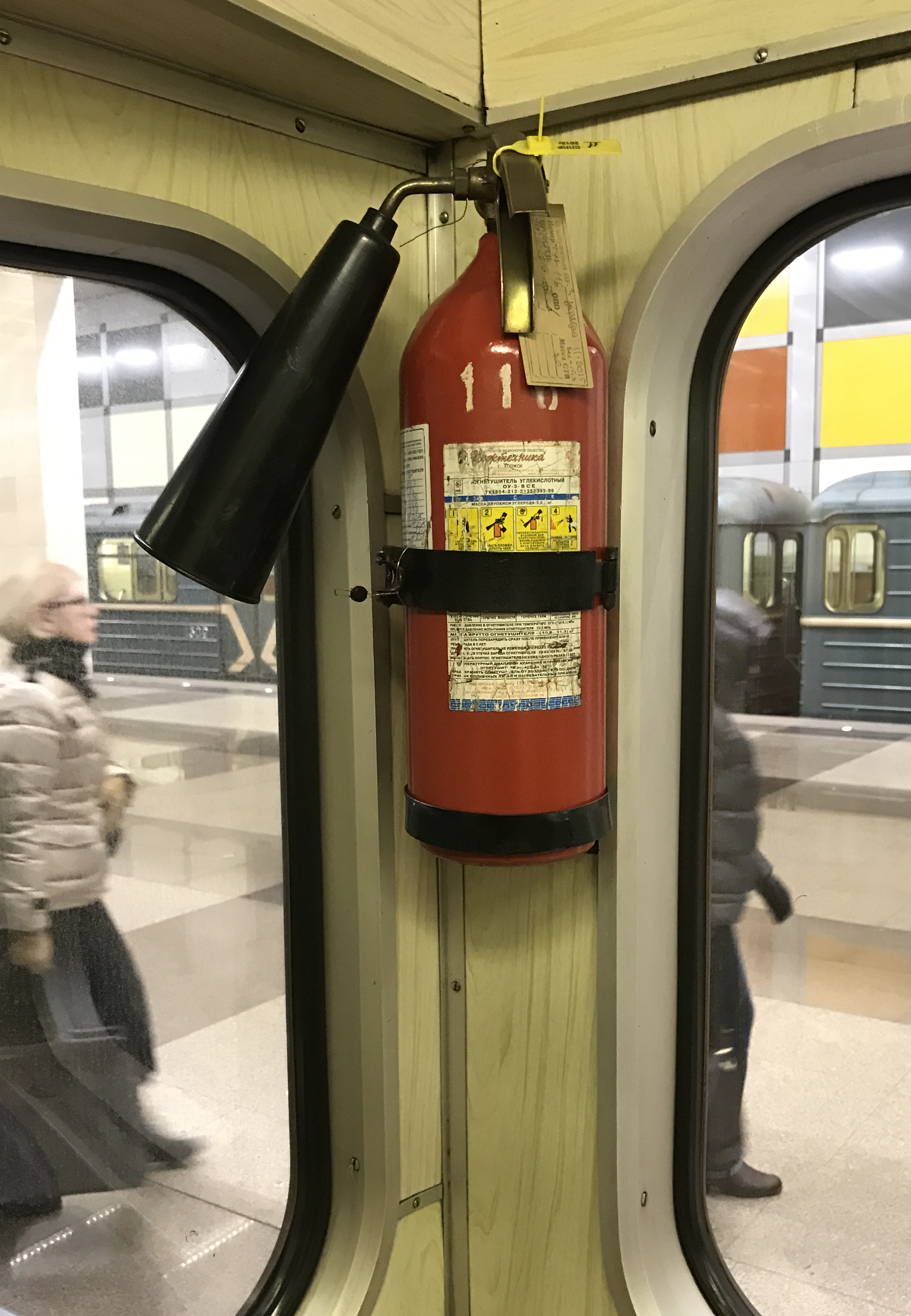 Огнетушитель углекислотный в вагоне московского метрополитена. Производитель огнетушителя - "Пожтехника", г. Торжок